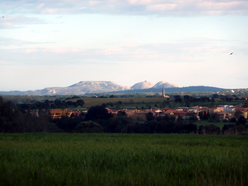 El massís del Montgrí i el campanar de Borrassà (Alt Empordà) il·luminats pel sol ponent. Fotografia presa des de Vilanant (Alt Empordà).